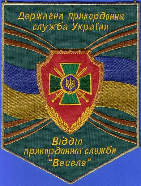 Эмблема ДПСУ (Государственной Пограничной Службы Украины) на вымпеле отряда Весёлое (Харьковский район) Харьковской области.